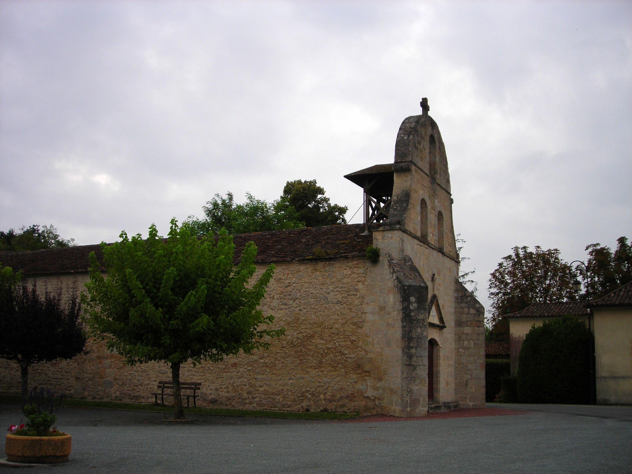 Église de Monfaucon, Dordogne.